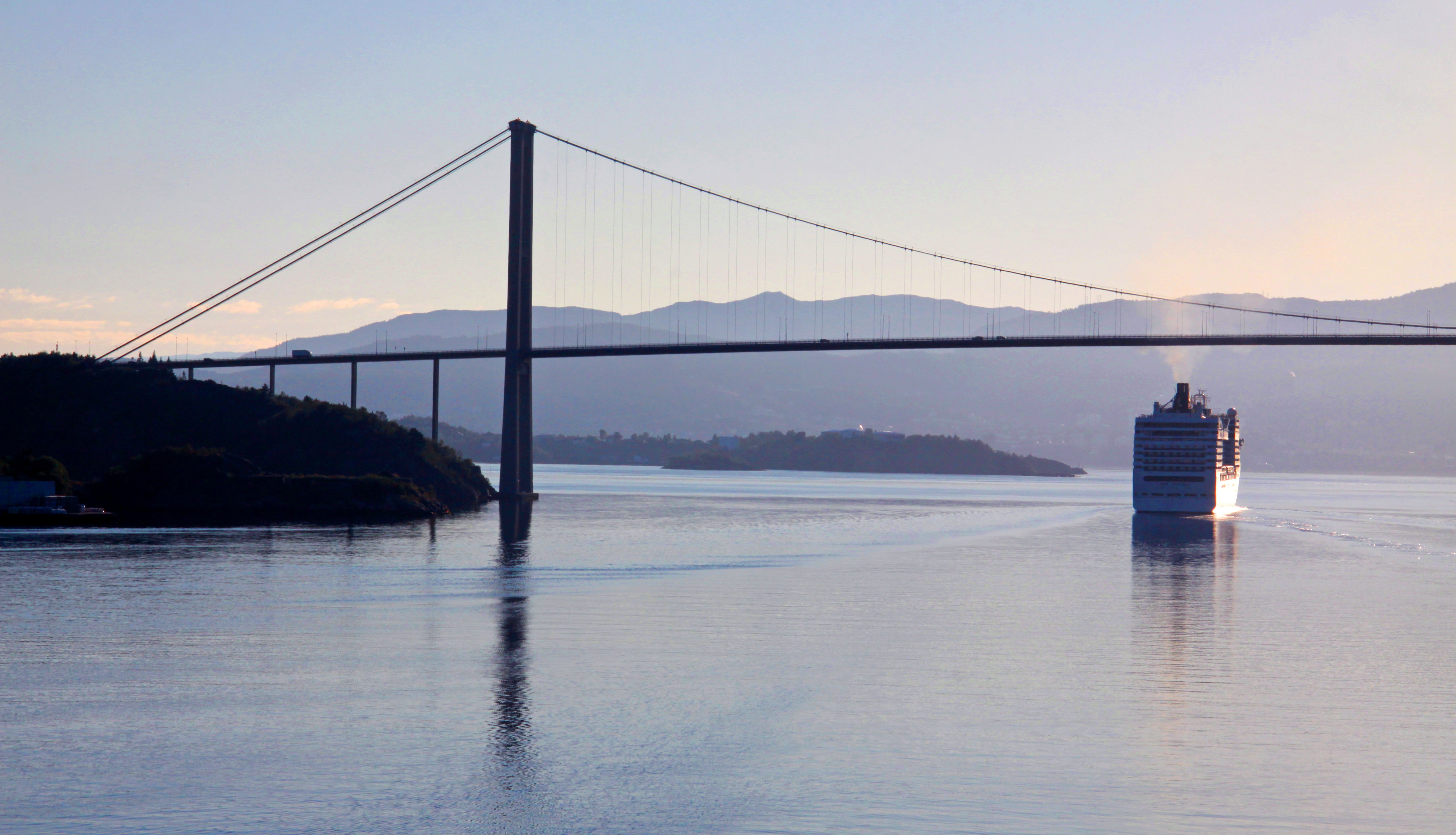 Bergen. Passage sous le pont d'Askøy.